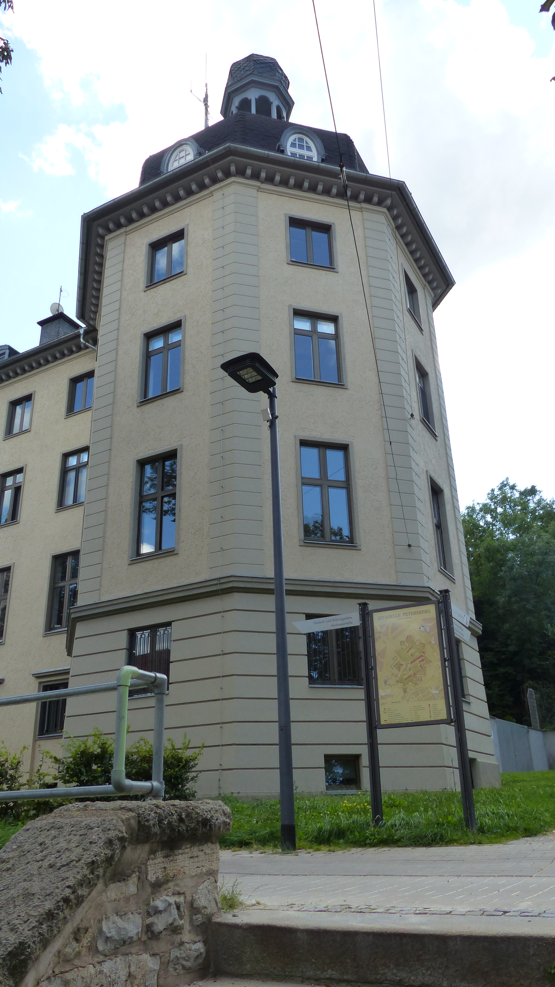 Denkmalgeschütztes Verwaltungsgebäude, Andreasstraße 38, Erfurt